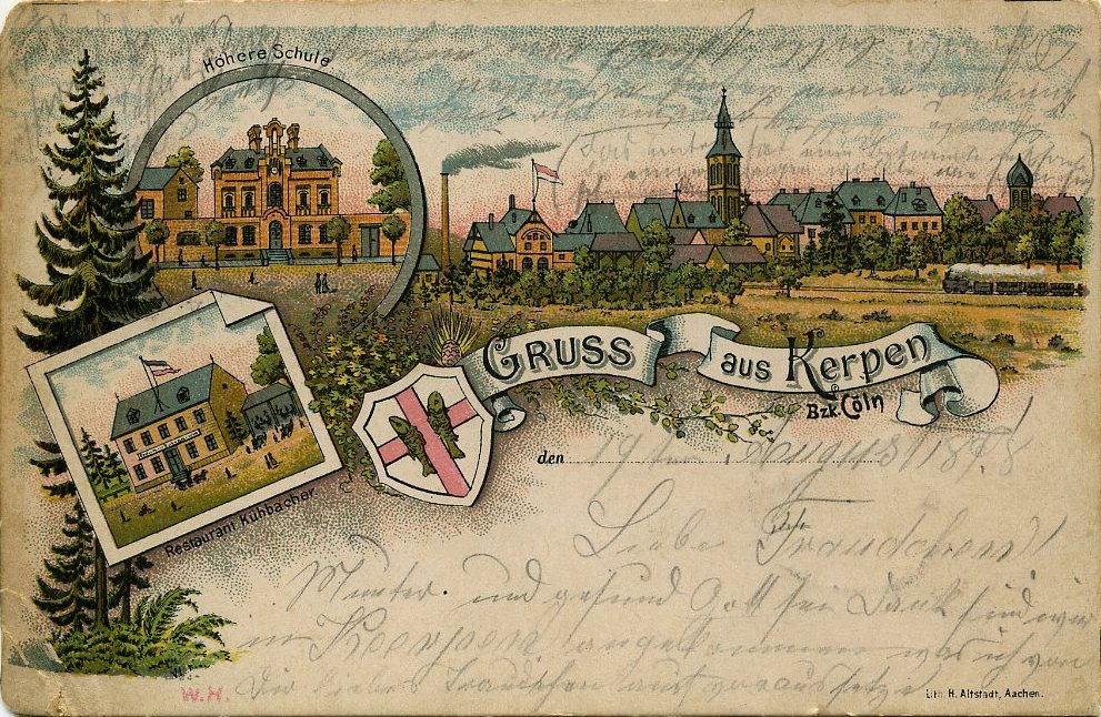 Gruss aus Kerpen - 1898-Höhere Schule- Restaurant Kübacher